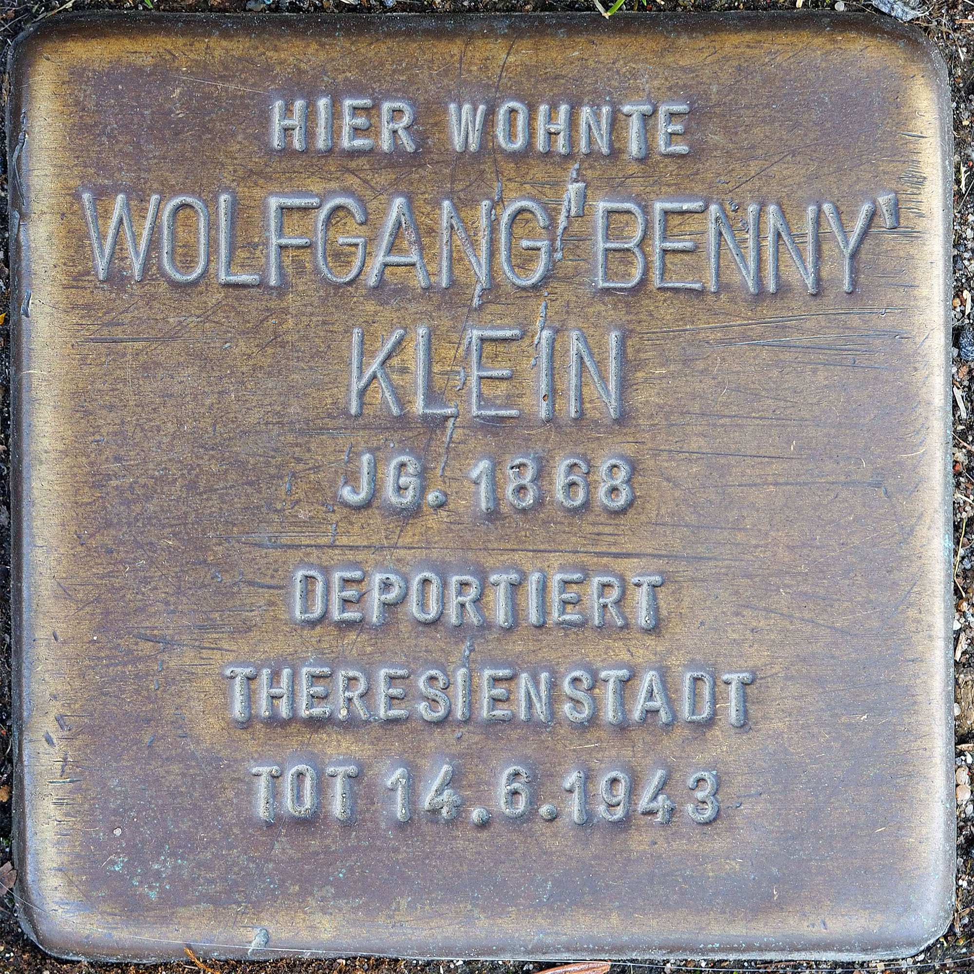 Stolpersteine Korschenbroich: Klein, Wolfgang